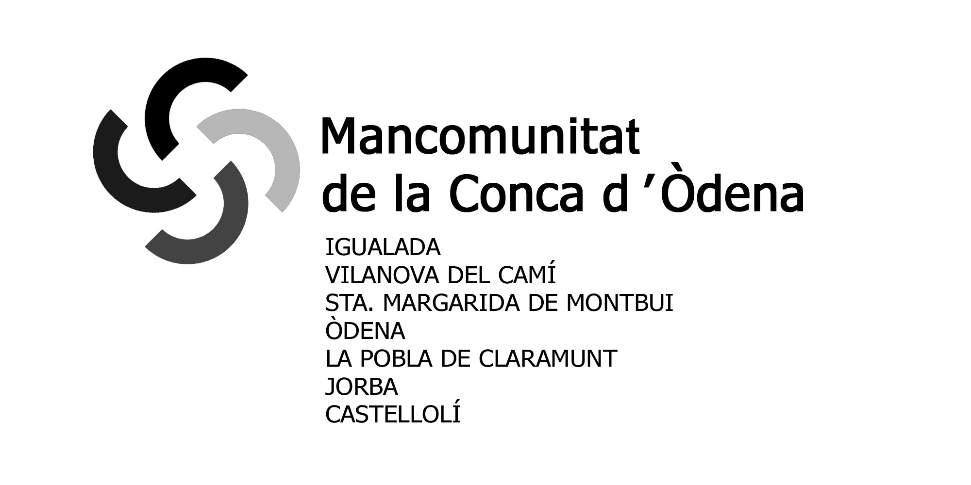 Logo de la entidad pública Mancomunidad intermunicipal de la Conca d'Òdena. Con el nombre de los pueblos que forman parte de la misma